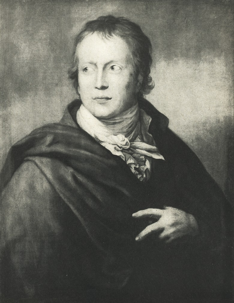 Bildnis des Schriftstellers August Mahlmann